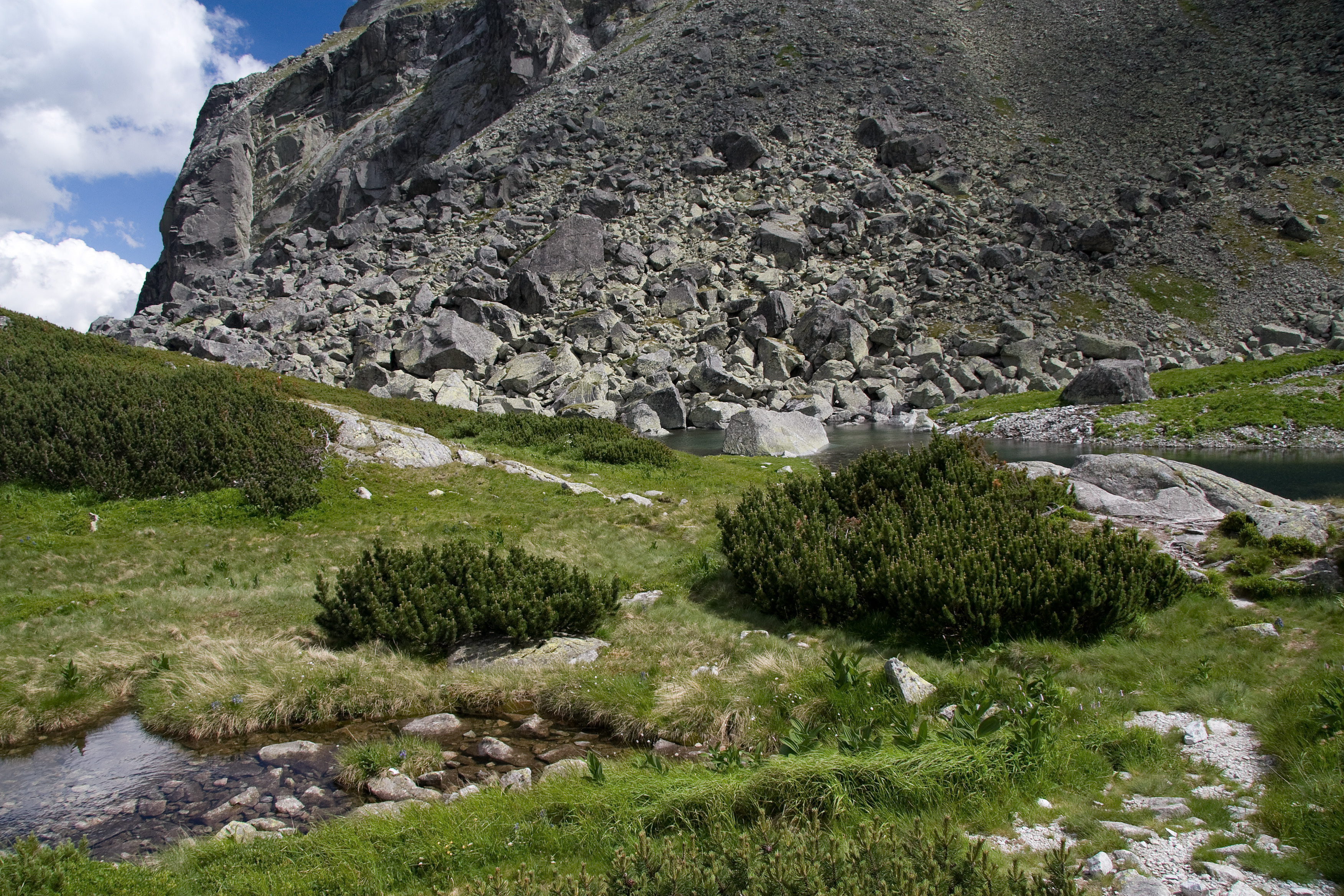 Vareškové pleso